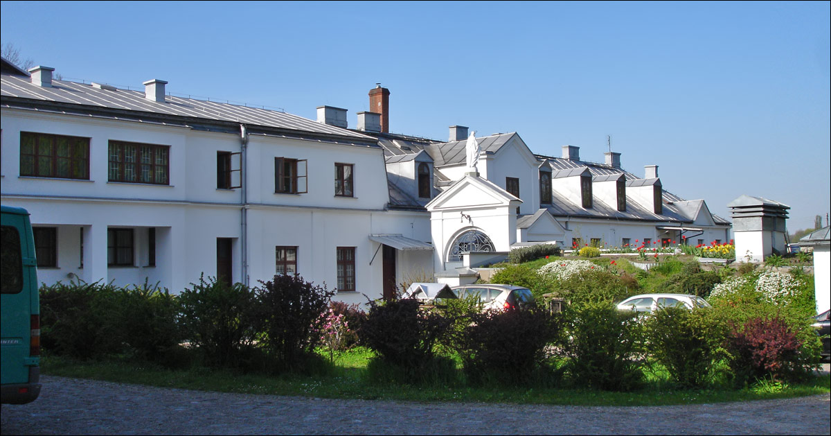 Szymanów - Szymanówek